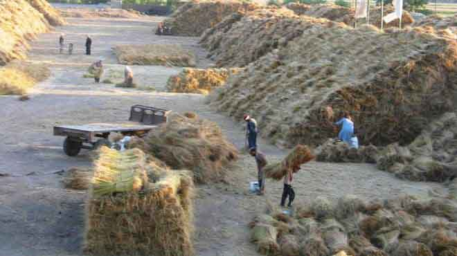 تشوين الكتان بشبراملس تمهيدا لتصنيعه